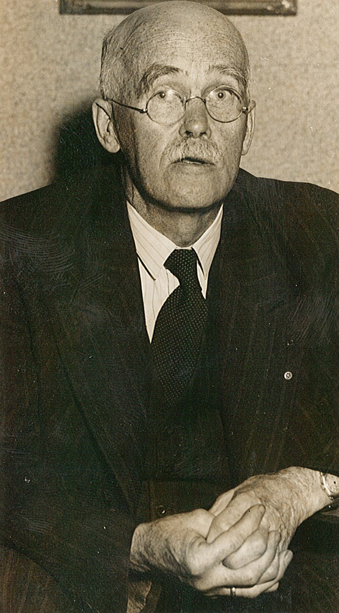 Portrett av Anders Beer Wilse, mann, fotograf, sittende halvfigur.